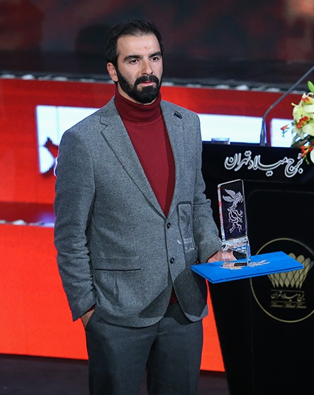 محسن قرائی در اختتامیه سی‌وهفتمین جشنواره فیلم فجر